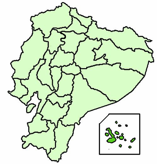 Mappa del vicariato apostolico di Galapagos, in Ecuador. Lavoro personale.